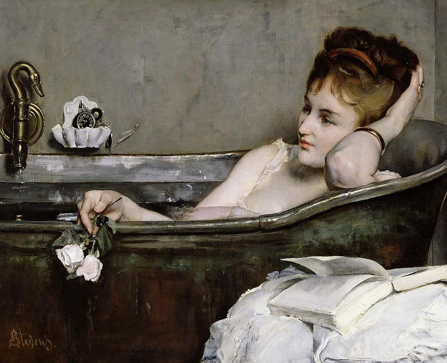 Le Bain